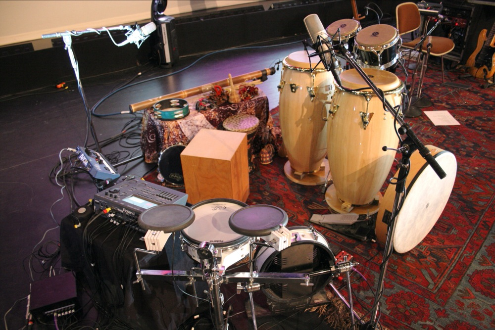 Diverse slaginstrumenten.